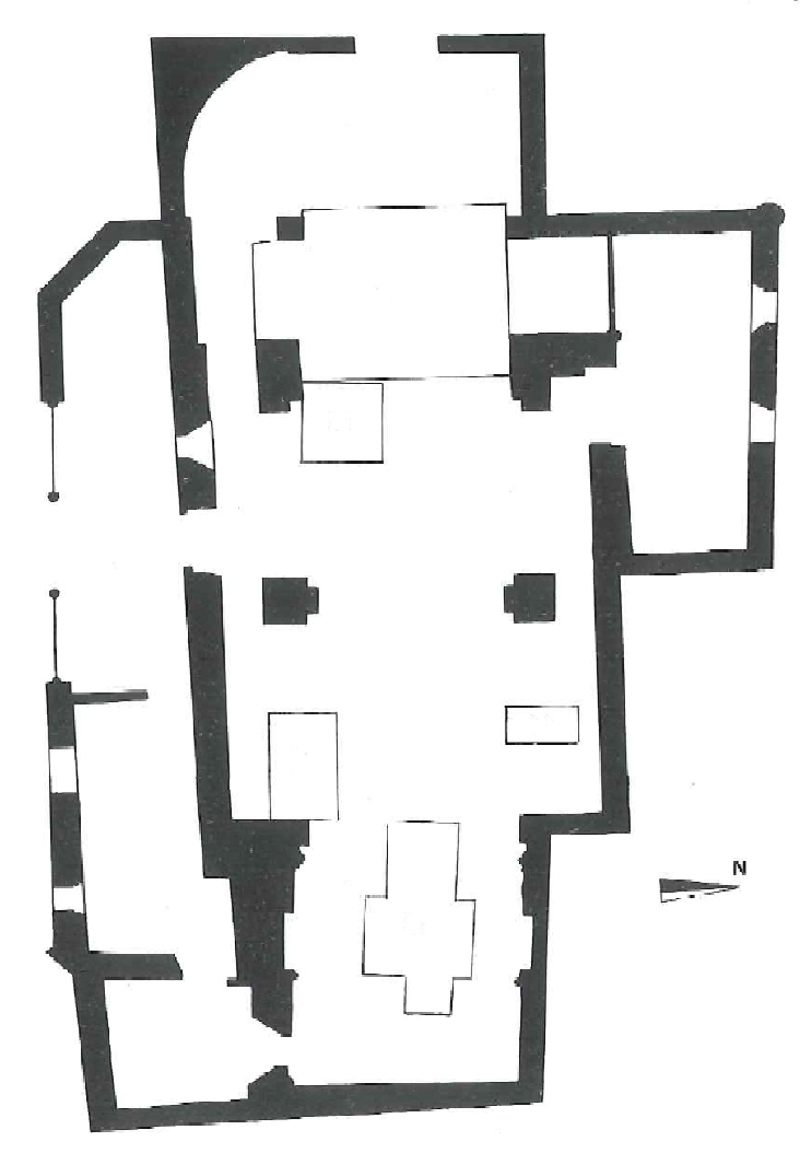 Planta actual de la Iglesia de Nuestra Señora de Muslera (Guarnizo, Cantabria)